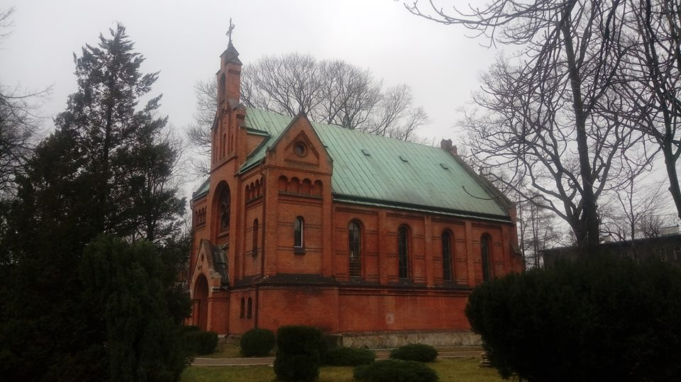 Rybnik – kaplica Najświętszego Serca Pana Jezusa w szpitalu przy ulicy Gliwickiej.